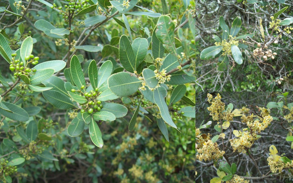 Lithraea brasiliensis. Anacardiaceae. Fotos tomadas en Abras de Zabaleta al margen de la Ruta 81, departamento de Lavalleja, Uruguay.